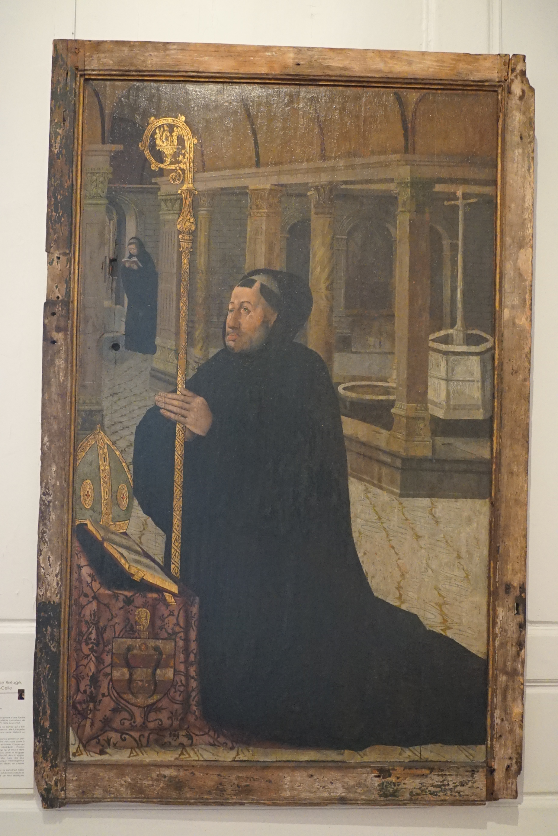 Ancienne porte , traces de la serrure sur le panneau, qui cachait un Ecce Homo ; présenté au musée Vauluisant de Troyes.